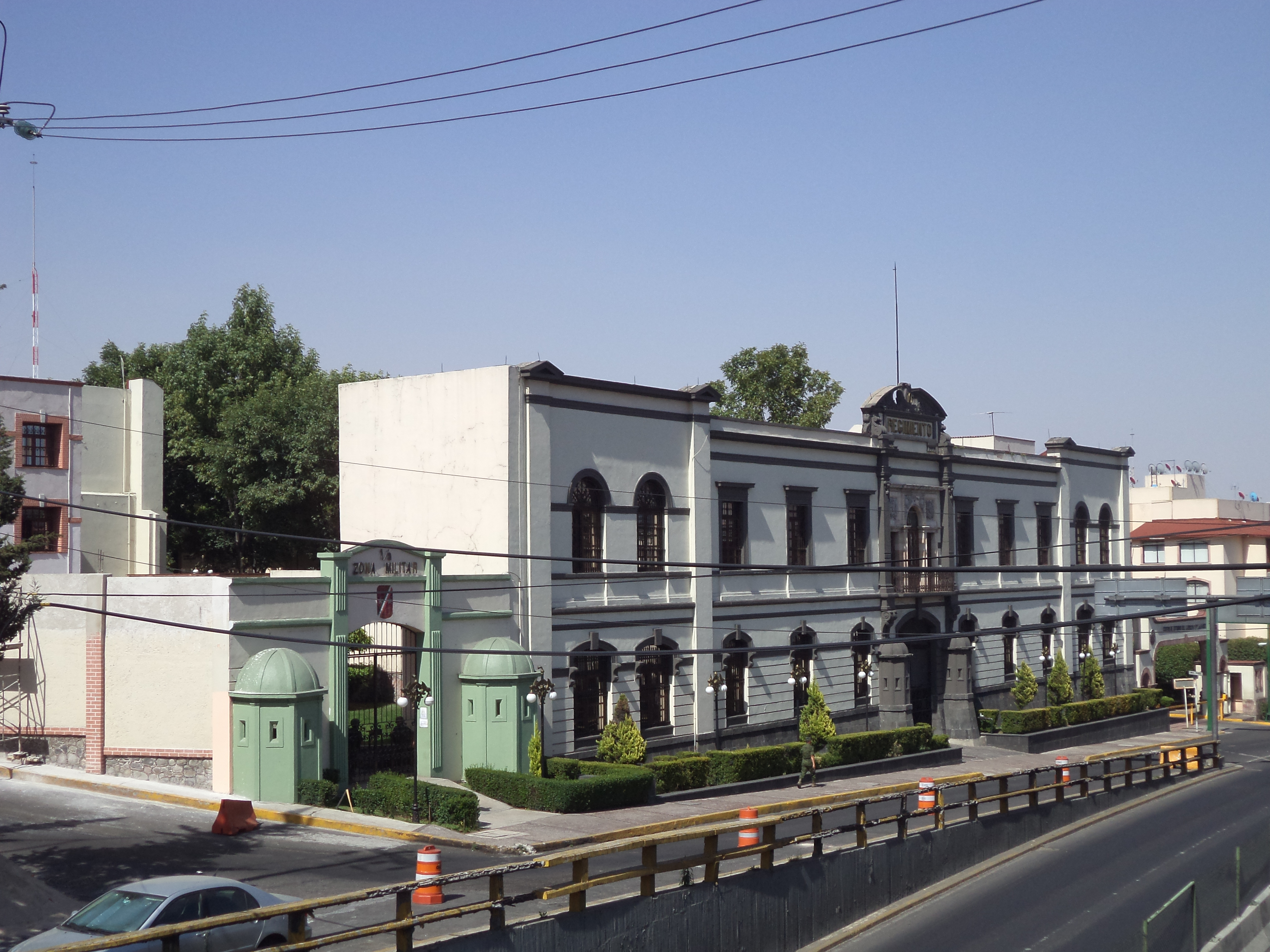 Antiguo Convento de San José de Tacubaya